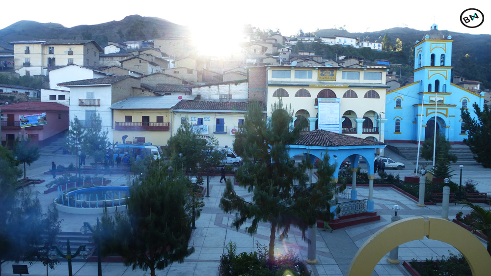 Capital de la provincia de Pallasca, provincia de Pallasca, Ancash, Perú